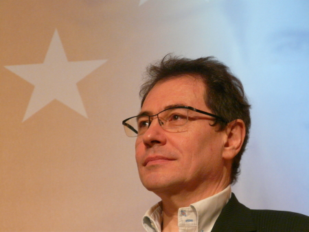 Robert Rochefort lors de la Convention européenne du MoDem, le 8 février 2009.